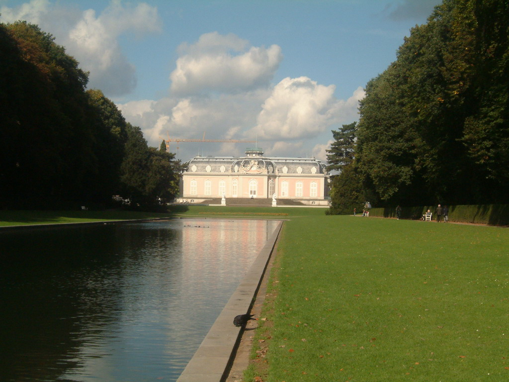 Die Südseite des Benrather Schlosses